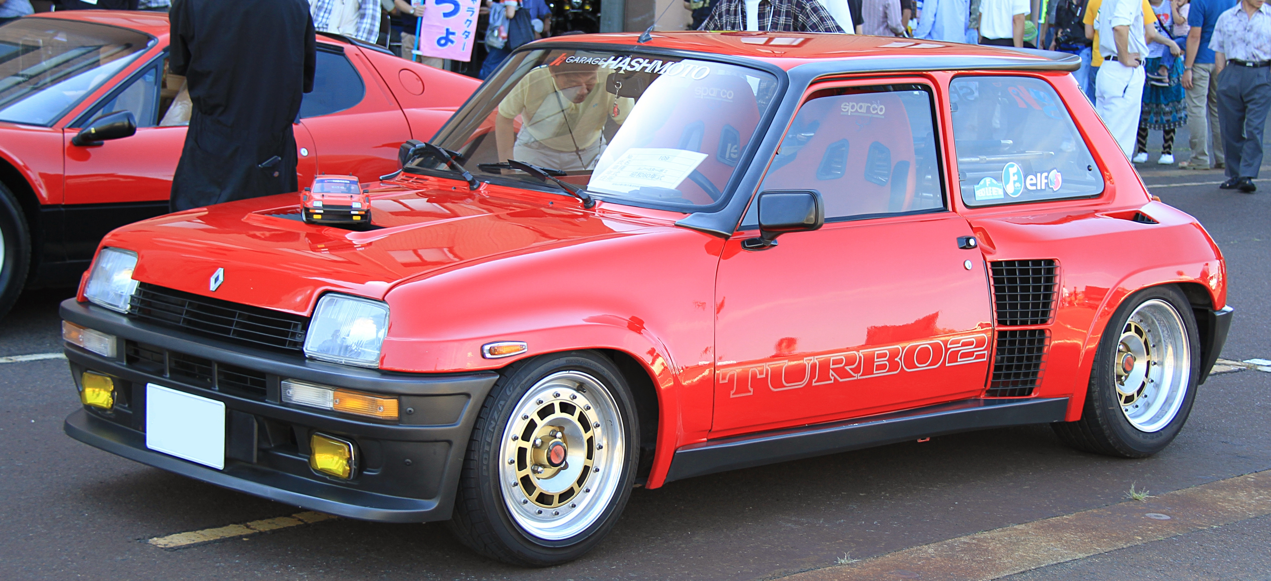 Renault 5